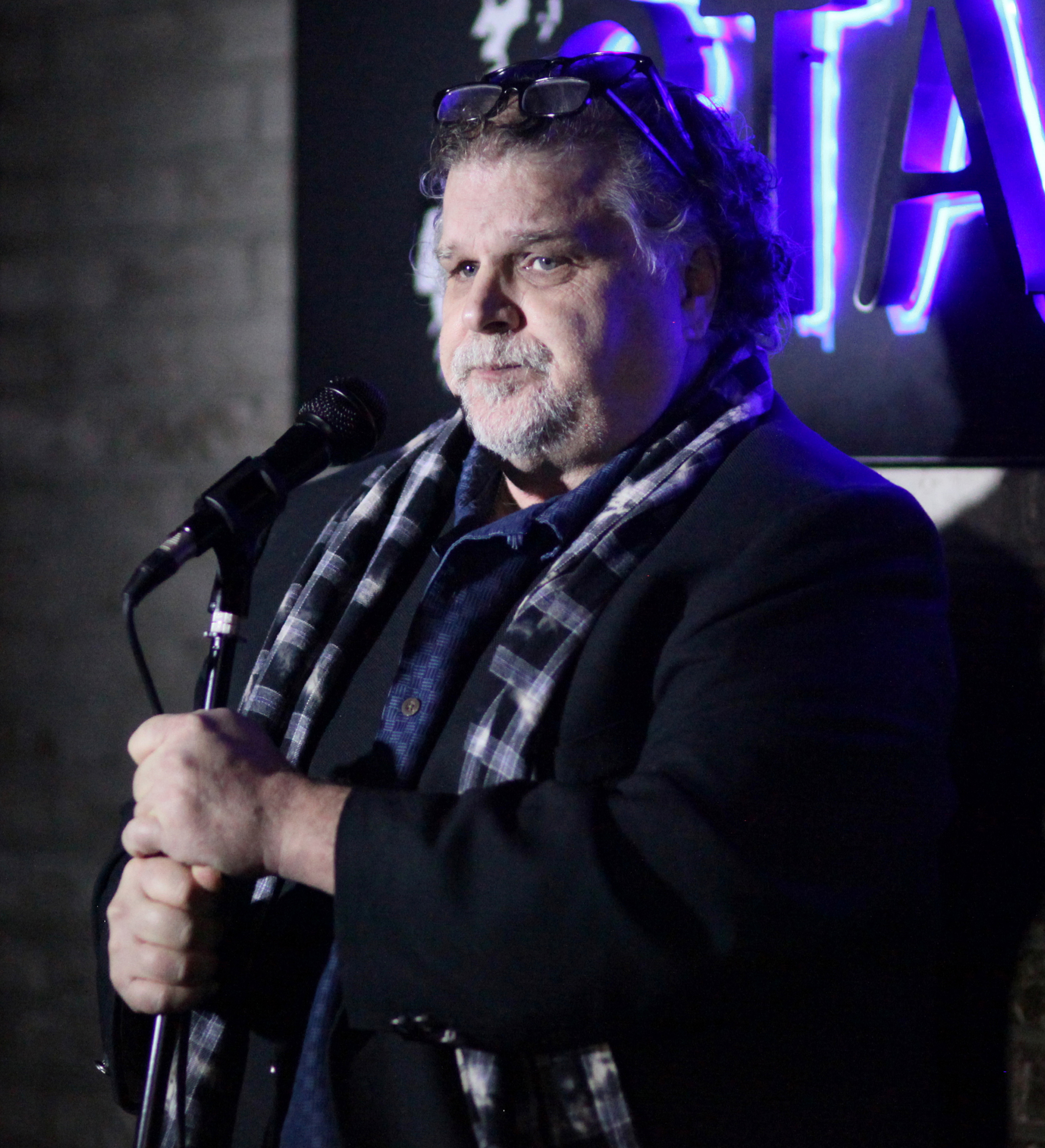 Bennington in December 2016.